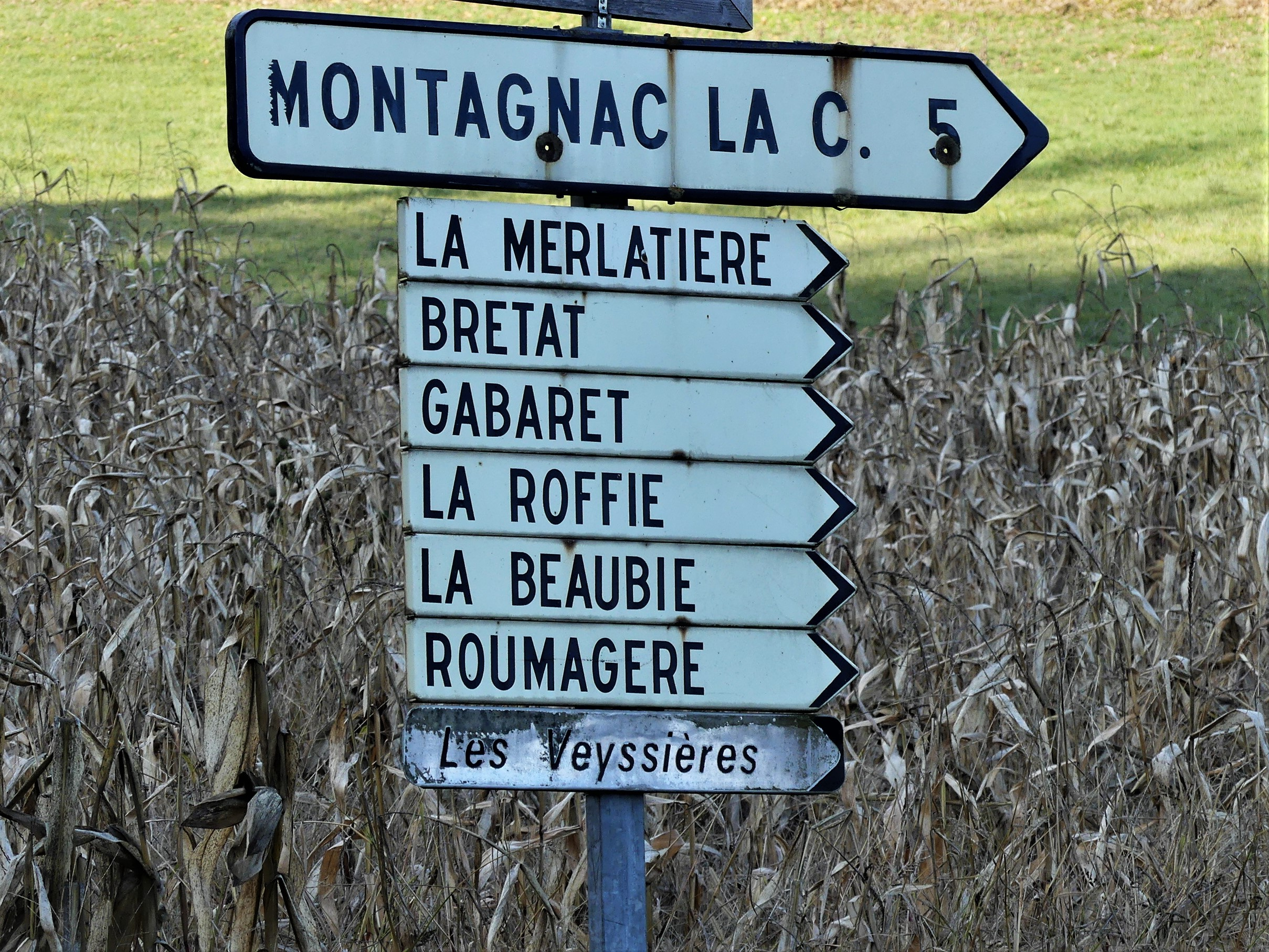 Panneaux de lieux-dits, Saint-Julien-de-Crempse, Dordogne, France.